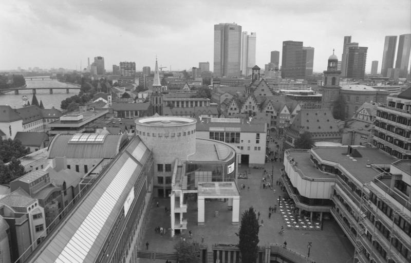 Juni 1988 Frankfurt am Main: Blick vom Dom.